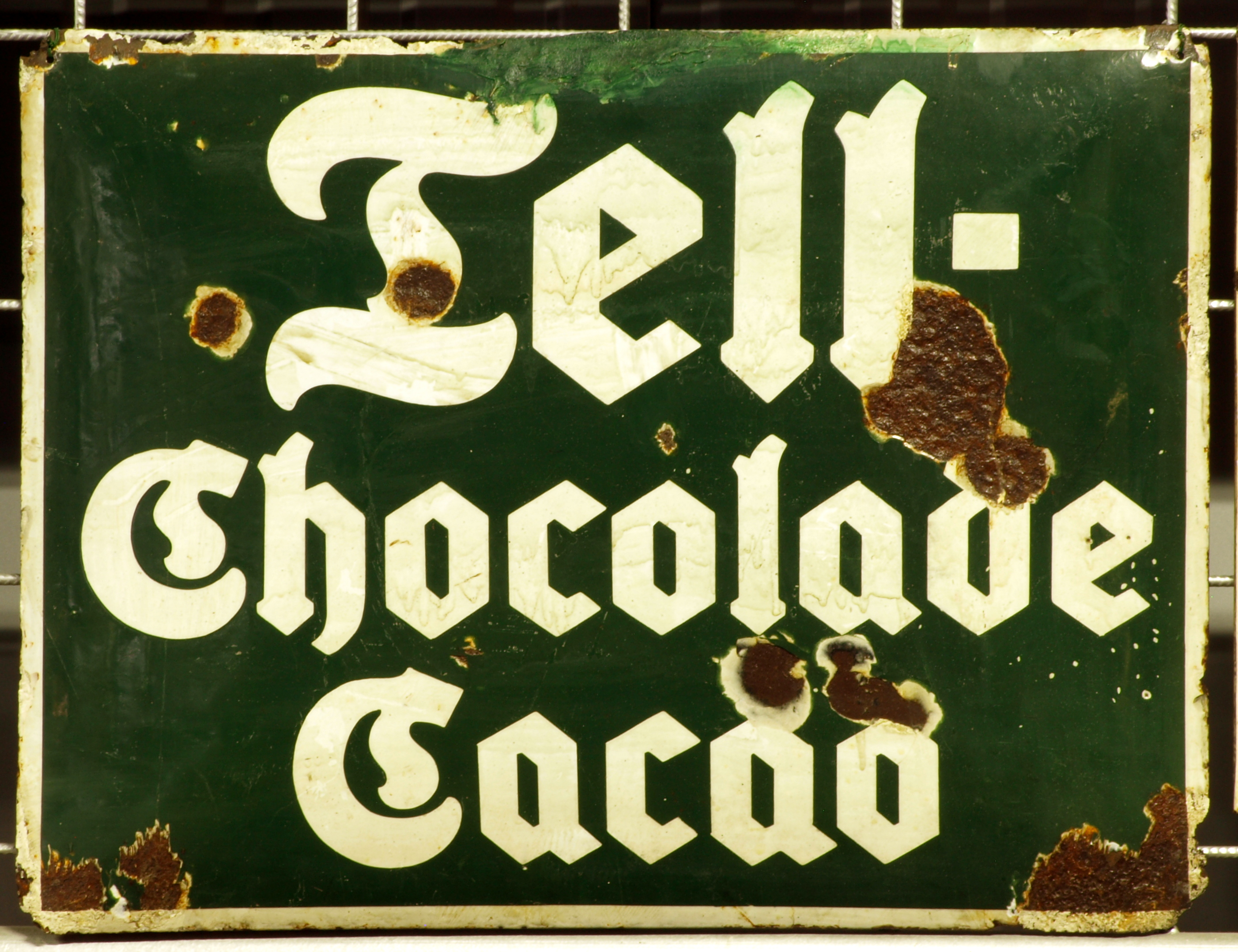 Enamel advertising sign, Tell-Chocolade Cacao.